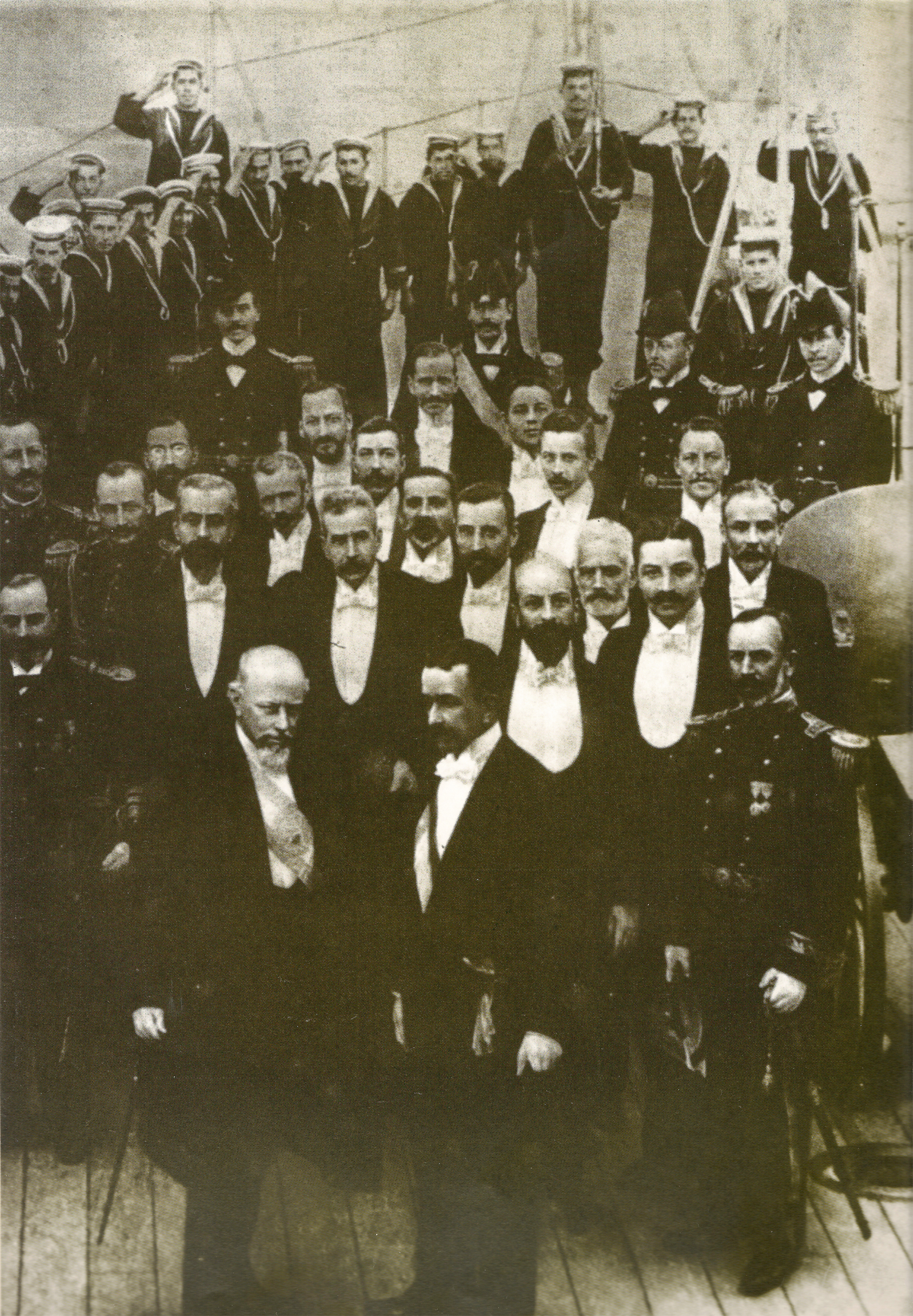 Los presidentes Julio A. Roca (Argentina) y Federico Errázuriz Echaurren (Chile) se reúnen en el Estrecho de Magallanes en 1899, encuentro llamado "El Abrazo del Estrecho"